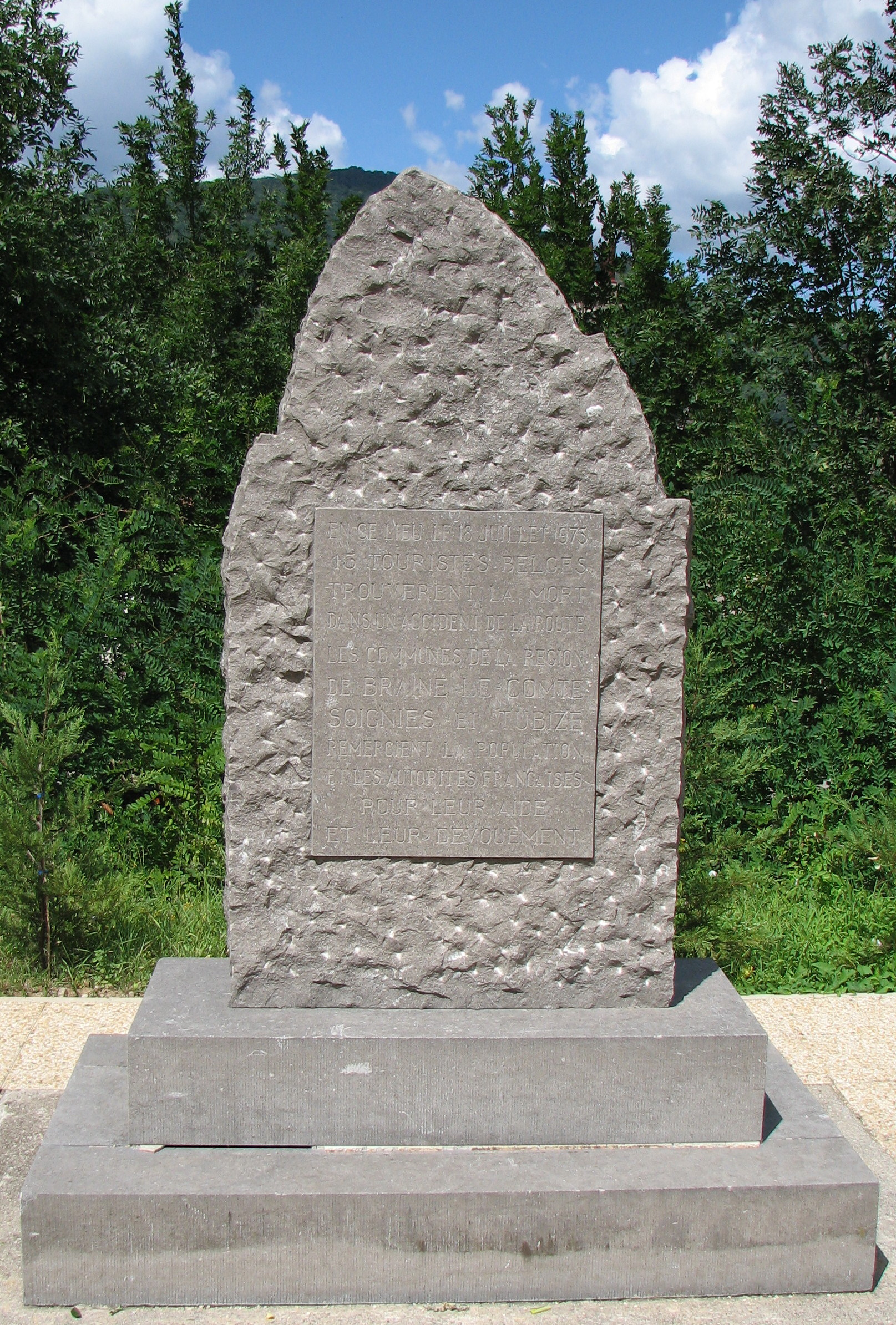 Stèle à la mémoire des morts de l'accident du car de pélerins belges du 18 juillet 1975 au bas descente de Laffrey